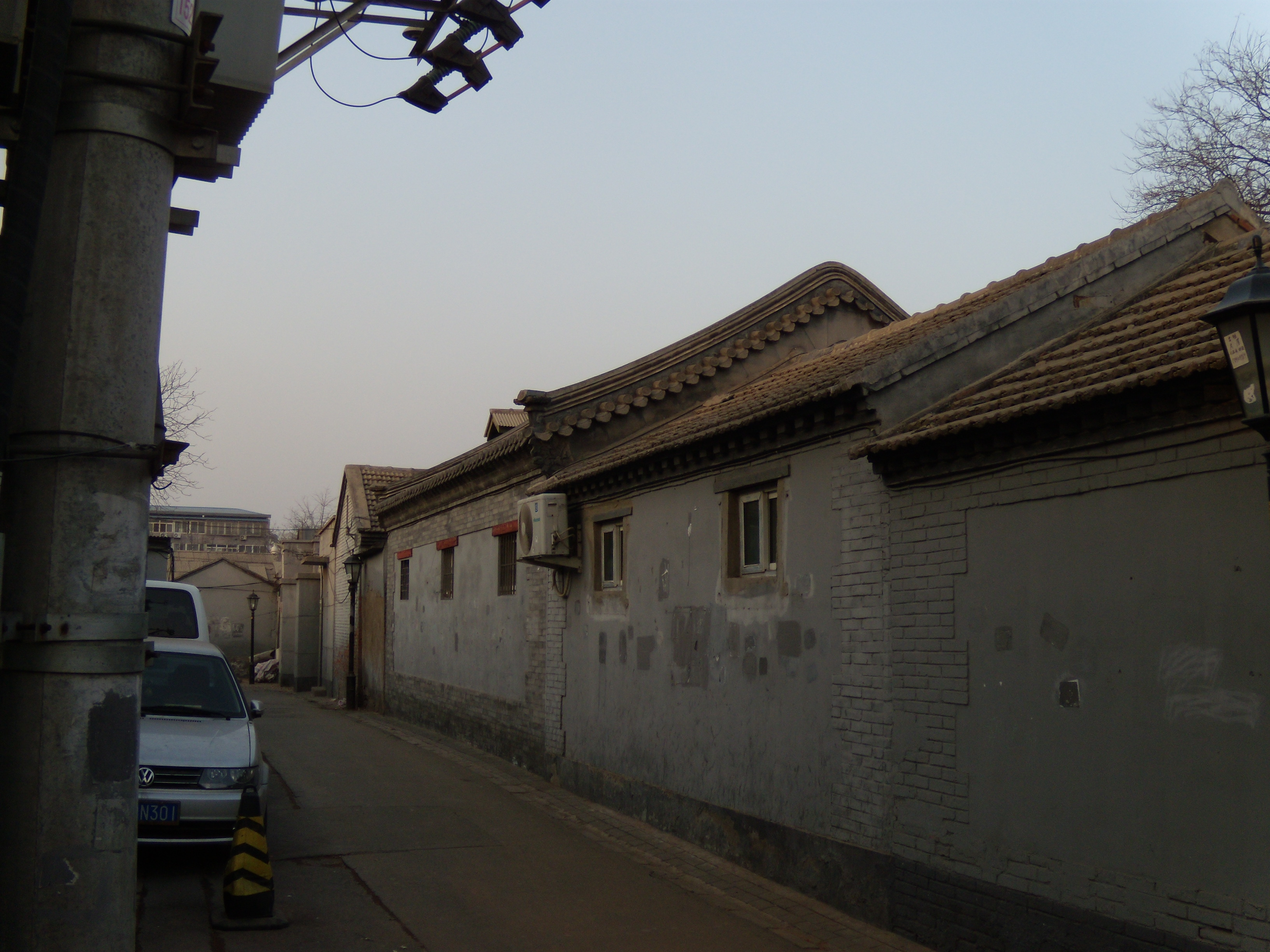 北京护国寺